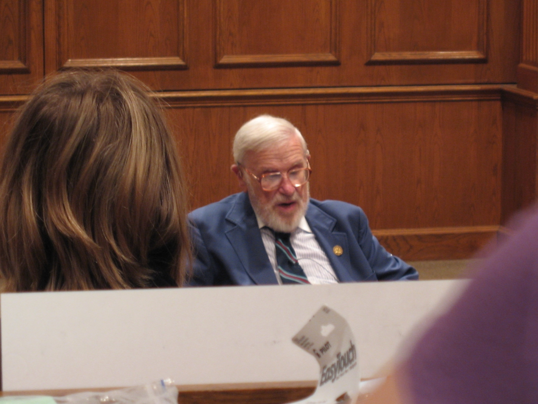 Glenn Doman nell'auditorio Valentine